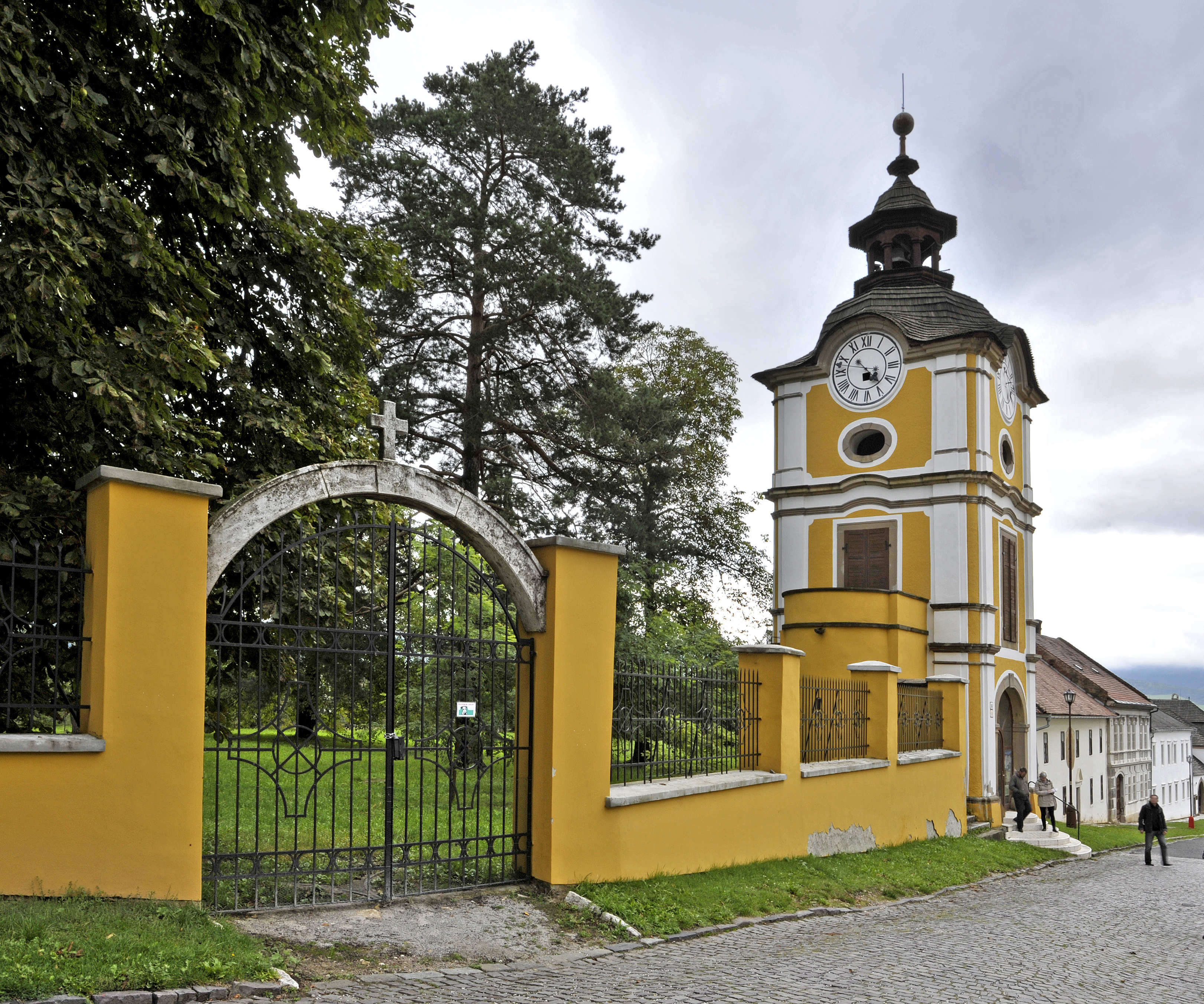 Zvonica